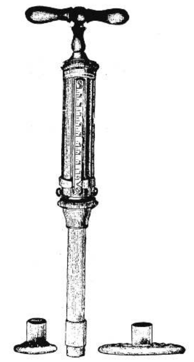 Algesimeter von Ismar Boas zur Messung der Schmerzintensität in Abhängigkeit von der Druckstärke am Abdomen